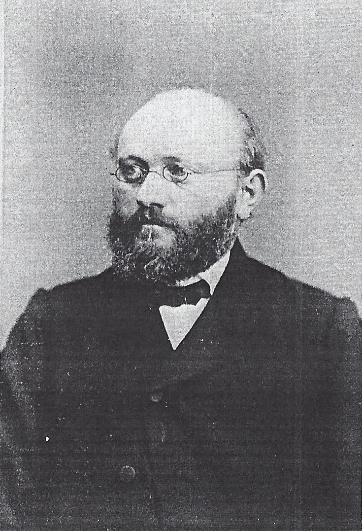 Porträtfotografie von Siegfried Wilhelm Albrecht (1826-1896)